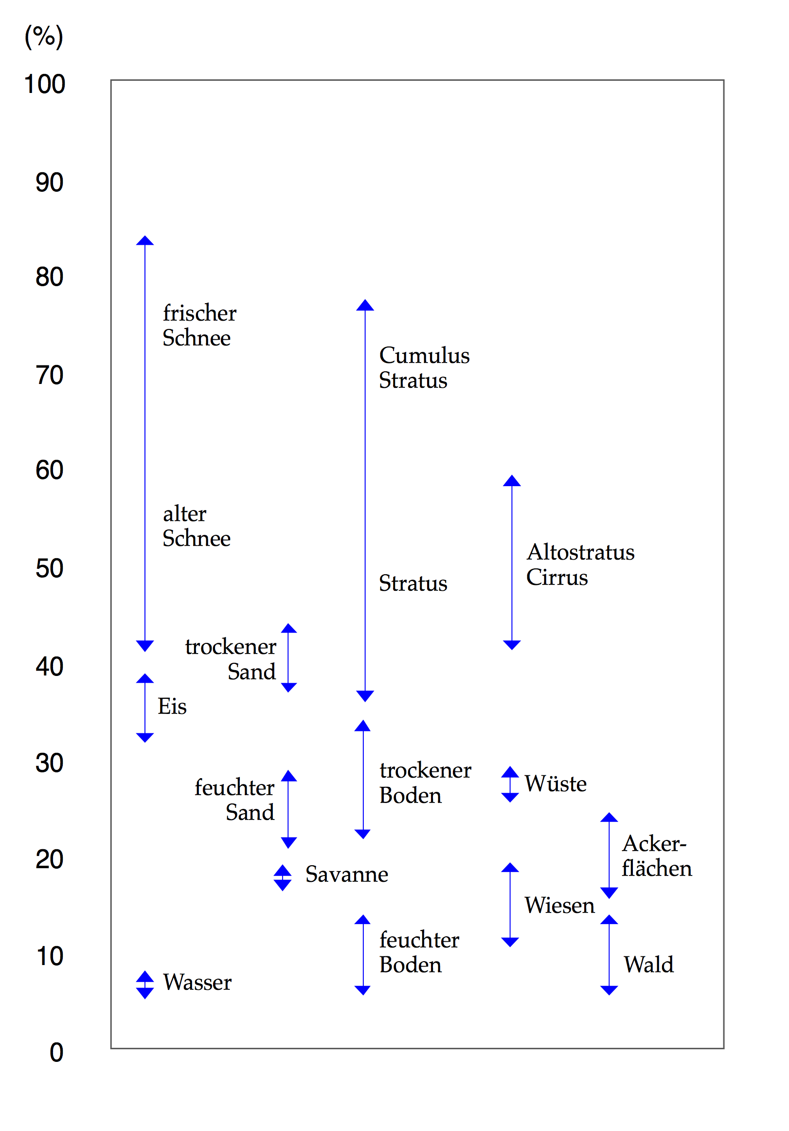 Albedo - Anteil [%] des in den Weltraum reflektierten Sonnenlichtes in Abhängigkeit von unterschiedlichen Erdoberflächenbeschaffenheiten